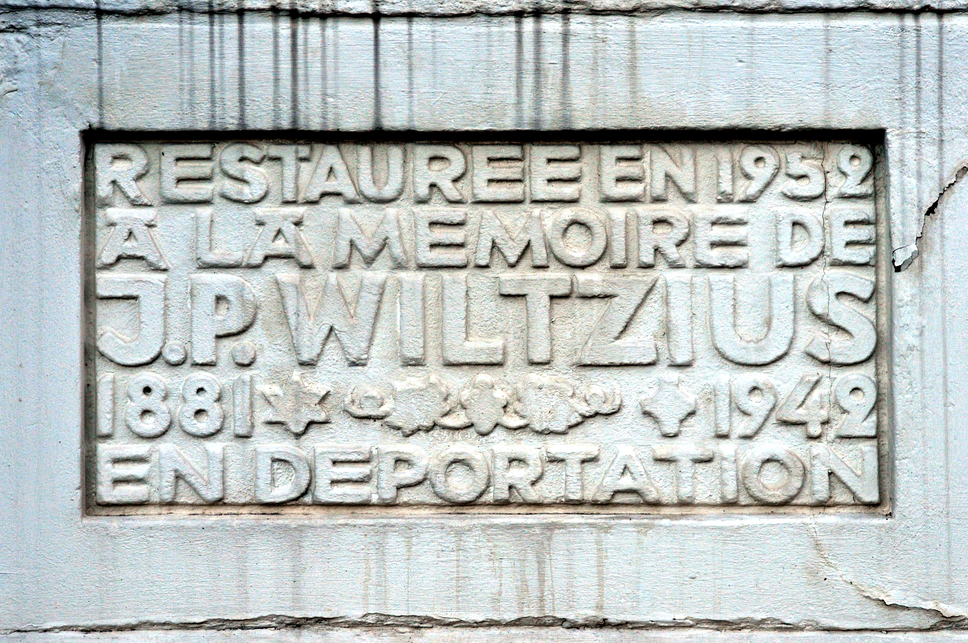 Erënnerung un de Jean-Pierre Wiltzius (1881-1942), mort en déportation, un engem Weekräiz zu Schwéidsbengen.